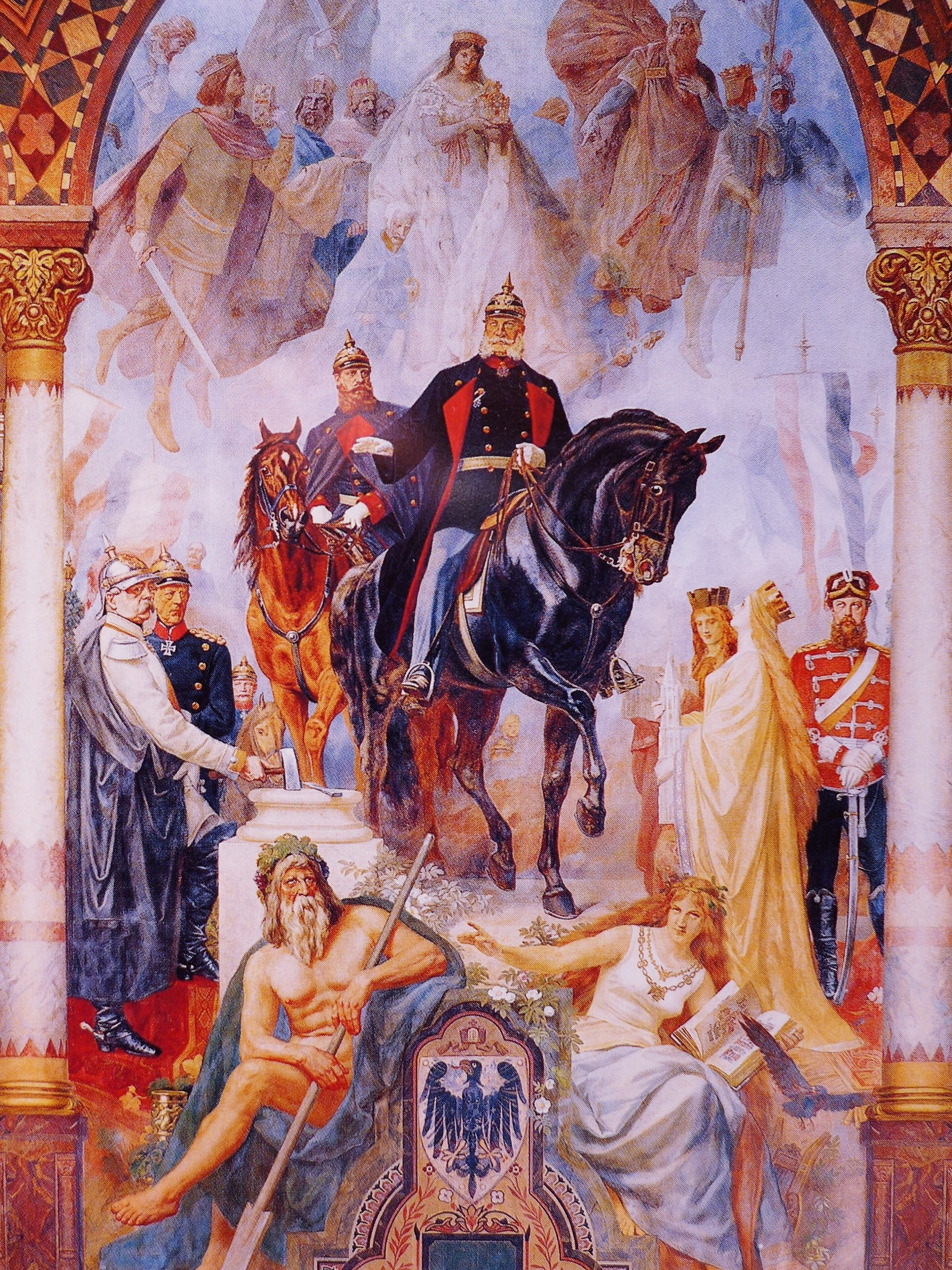 Hermann Wislicenus: Kaisersaal der Goslarer Kaiserpfalz, Zentralgemälde "Die Wiedererstehung des Deutschen Reiches 1871", Mitte: Wilhelm I. und Kronprinz Friedrich Wilhelm, Links: Bismarck, Moltke und Roon, Rechts: Alsatia (Elsass) mit dem Straßburger Münster und Lotharingia (Lothringen) mit dem Metzer Dom, Oben: Königin Luise von Preußen umgeben von mittelalterlichen Kaisern und Königen, Unten: Vater Rhein und die Allegorie der Sage